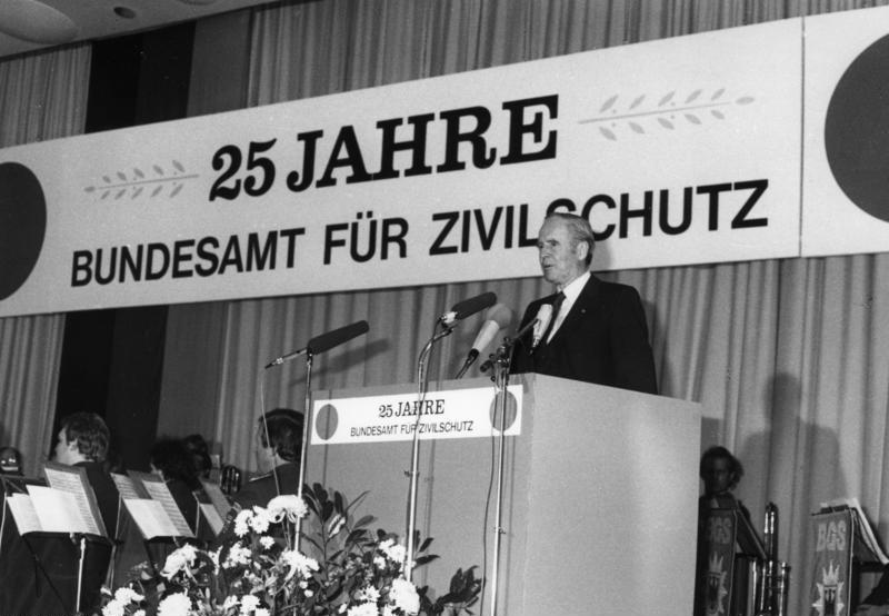 Bonn, 25 Jahre BZS, Karl Carstens 12.12.83 25 Jahre Bundesamt für Zivilschutz. Bundespräsident Karl Carstens. Foto: Kurt Hilberath [Bonn.- Bundespräsident Karl Carstens an Rednerpult zur Feier 25 Jahre Bundesamt für Zivilschutz] Abgebildete Personen: Carstens, Karl Prof. Dr.: Bundespräsident, MdB, CDU, Bundestagspräsident, Staatssekretär Auswärtiges Amt, Bundesrepublik Deutschland